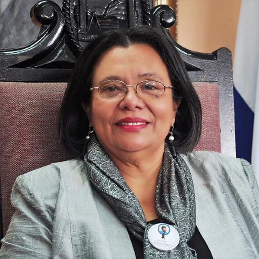 Julieta Castellanos